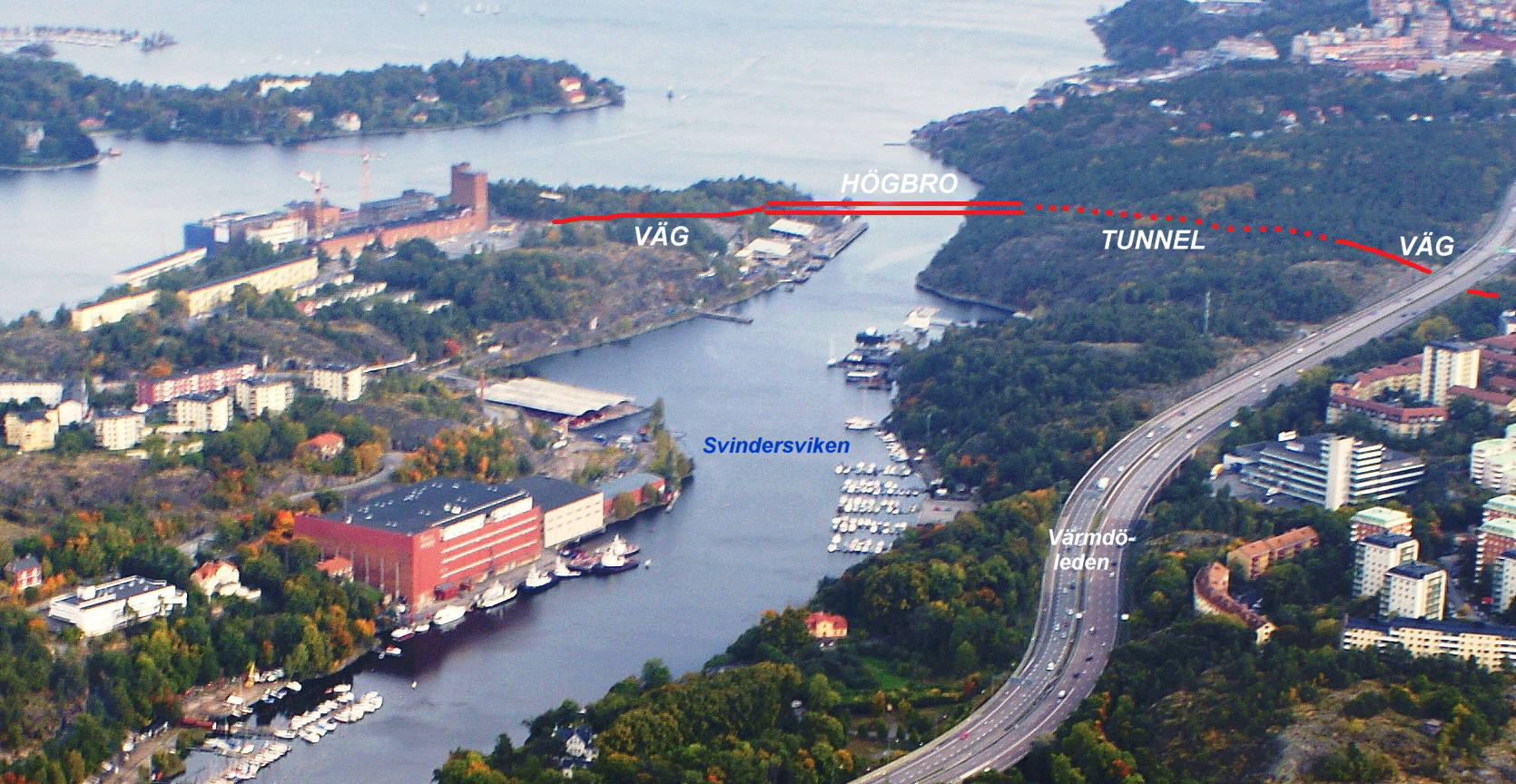 Den planerade Kvarnholmsförbindelsen